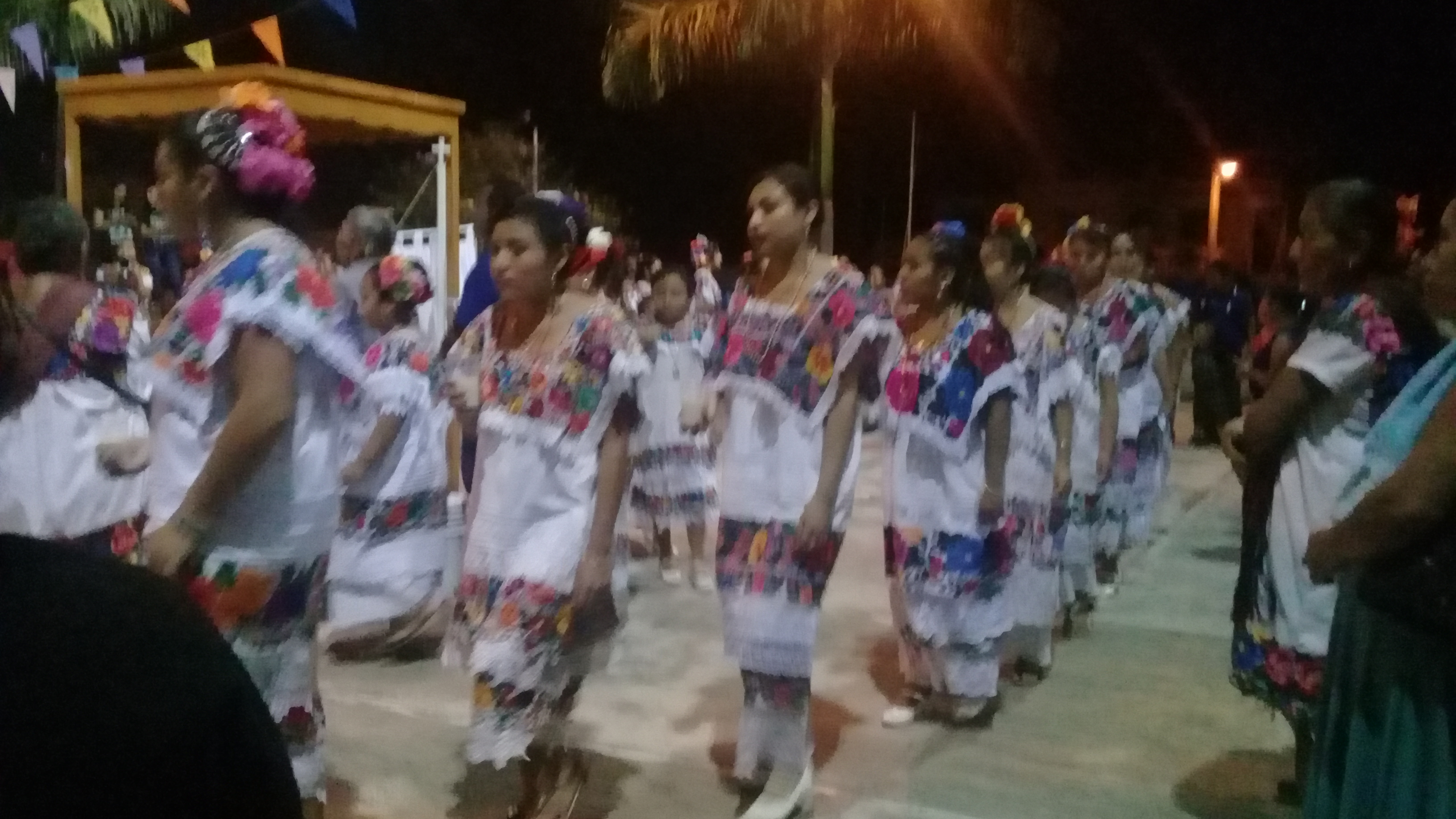 Es una tradición tipica del pueblo maya o de cada region de la península de Yucatán